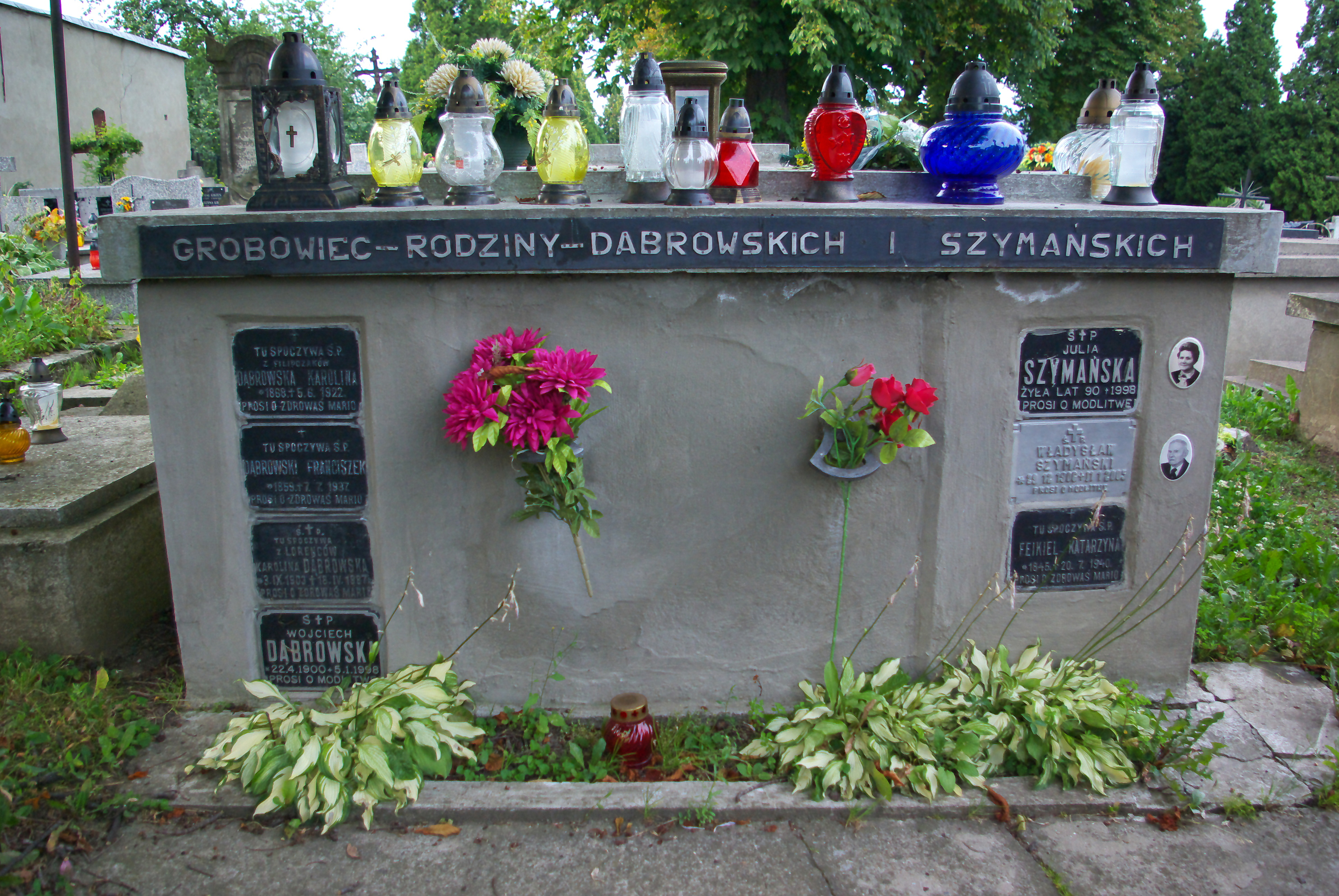 Grobowiec rodziny Dąbrowski i Szymański na Cmentarzu Centralnym w Sanoku. Spoczywa Wojciech Dąbrowski, kawaler Virtuti Militari